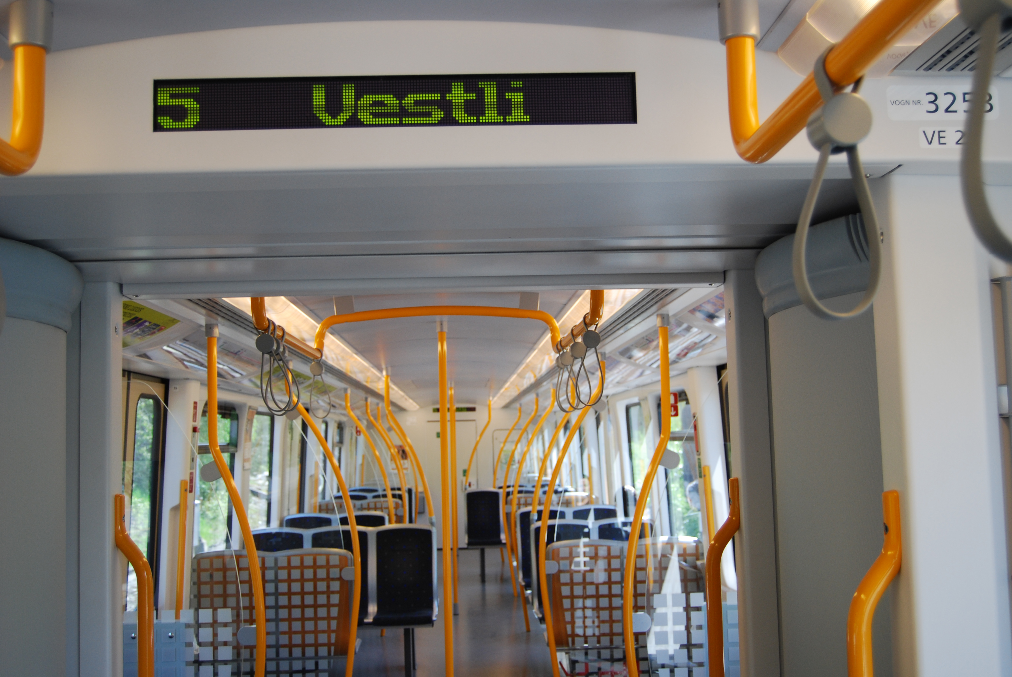 Kolejka T-bene ( Storo - Vestli, nr. 5, kolor oznakowania na schemacie mapy metra; różowy) czerwiec 2009 r. Stacja Vestli.